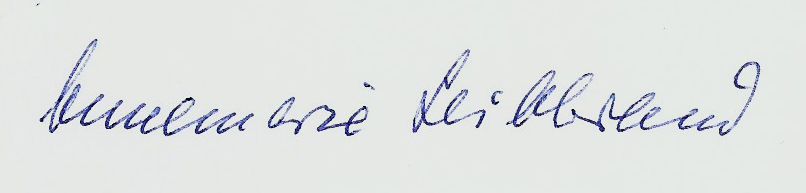 Annemarie Leibbrand schrieb mir am 20.01.1995 eine persönliche Karte und unterschrieb sie so.